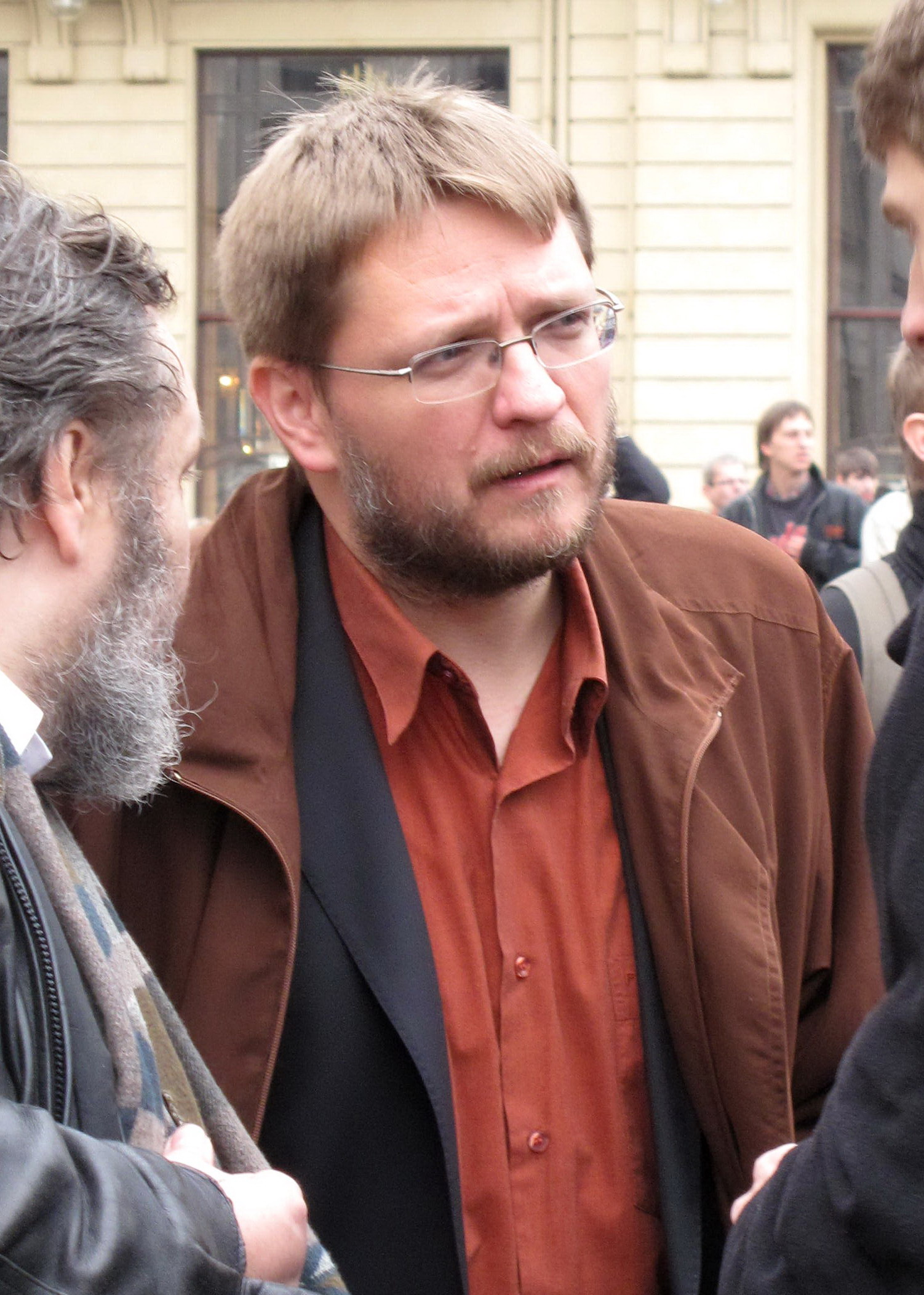 Michal Semín na Náměstí Republiky